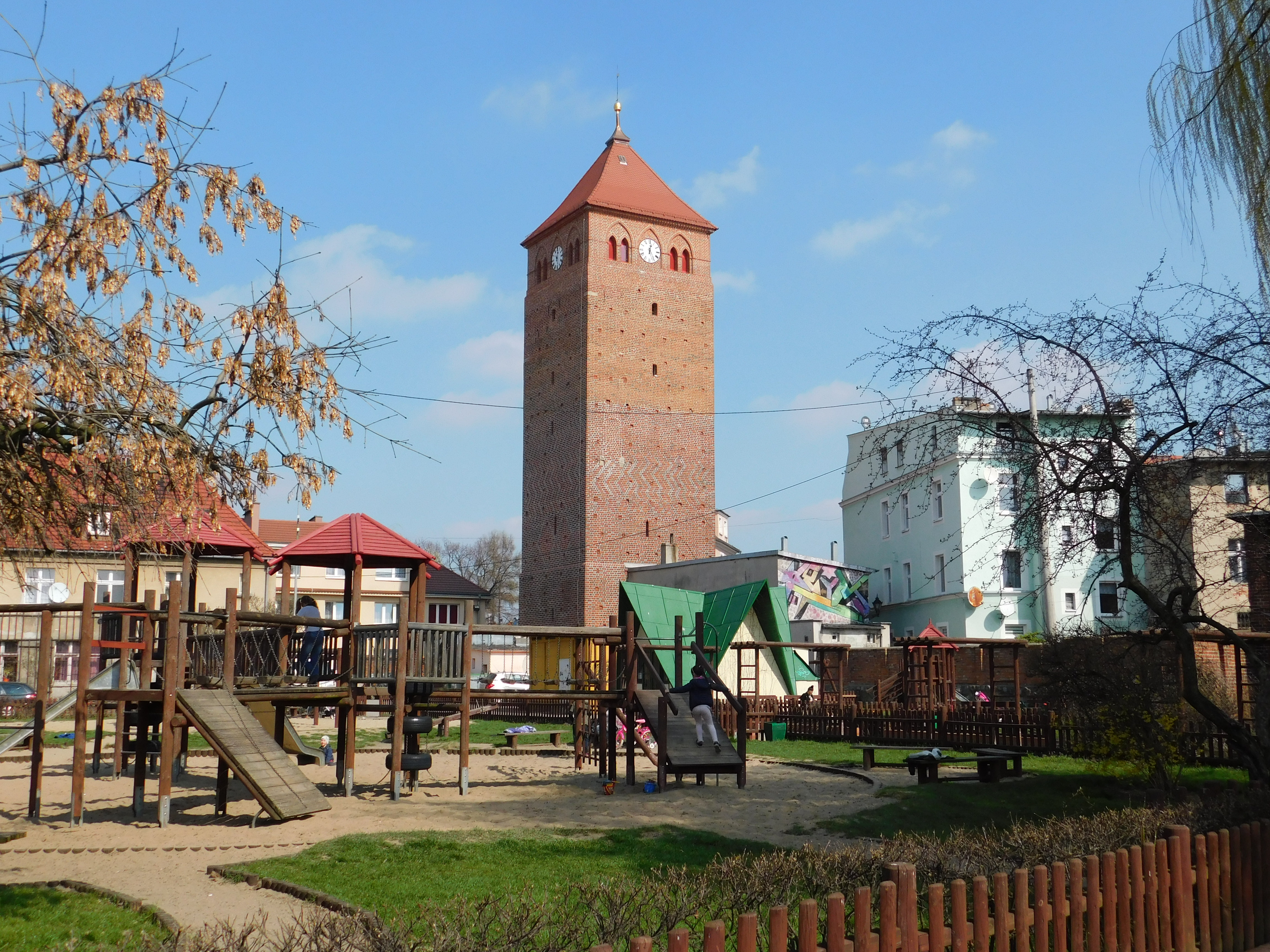 Widok na Wieżę Głogowską w Górze z ulicy Targowej